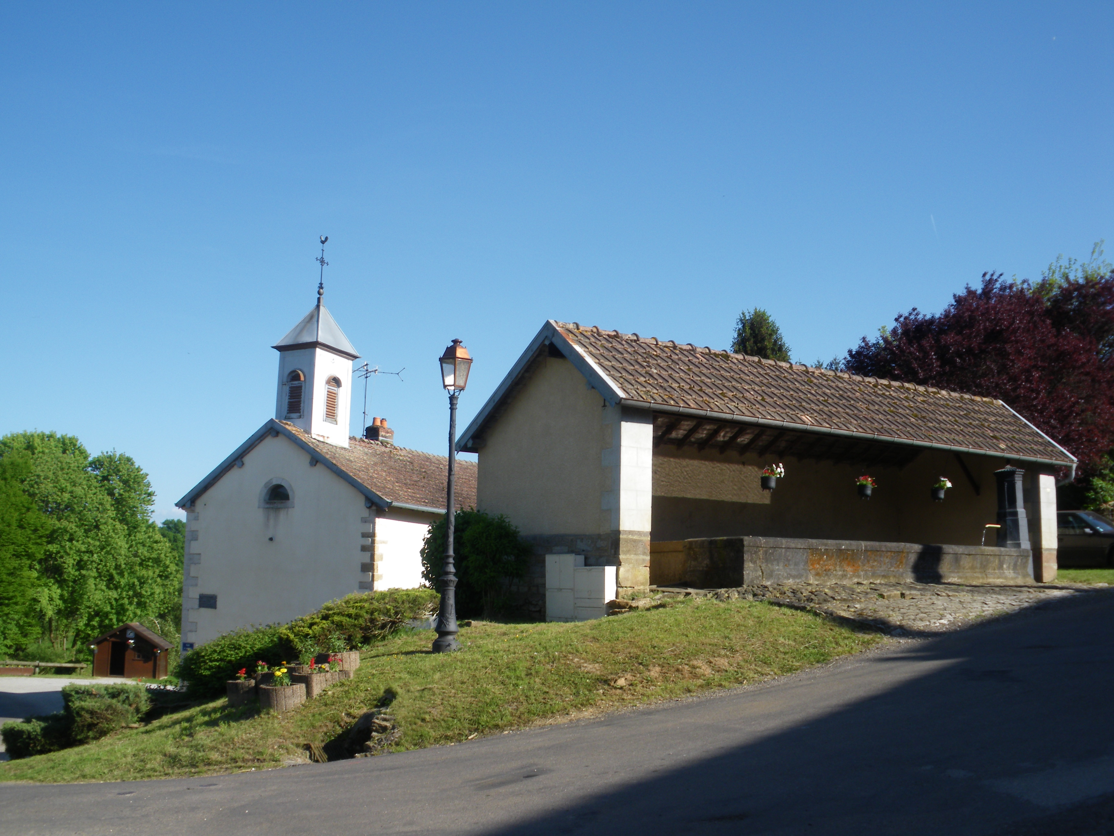 Oppenans (Haute-Saône) vue du lavoir et de la mairie